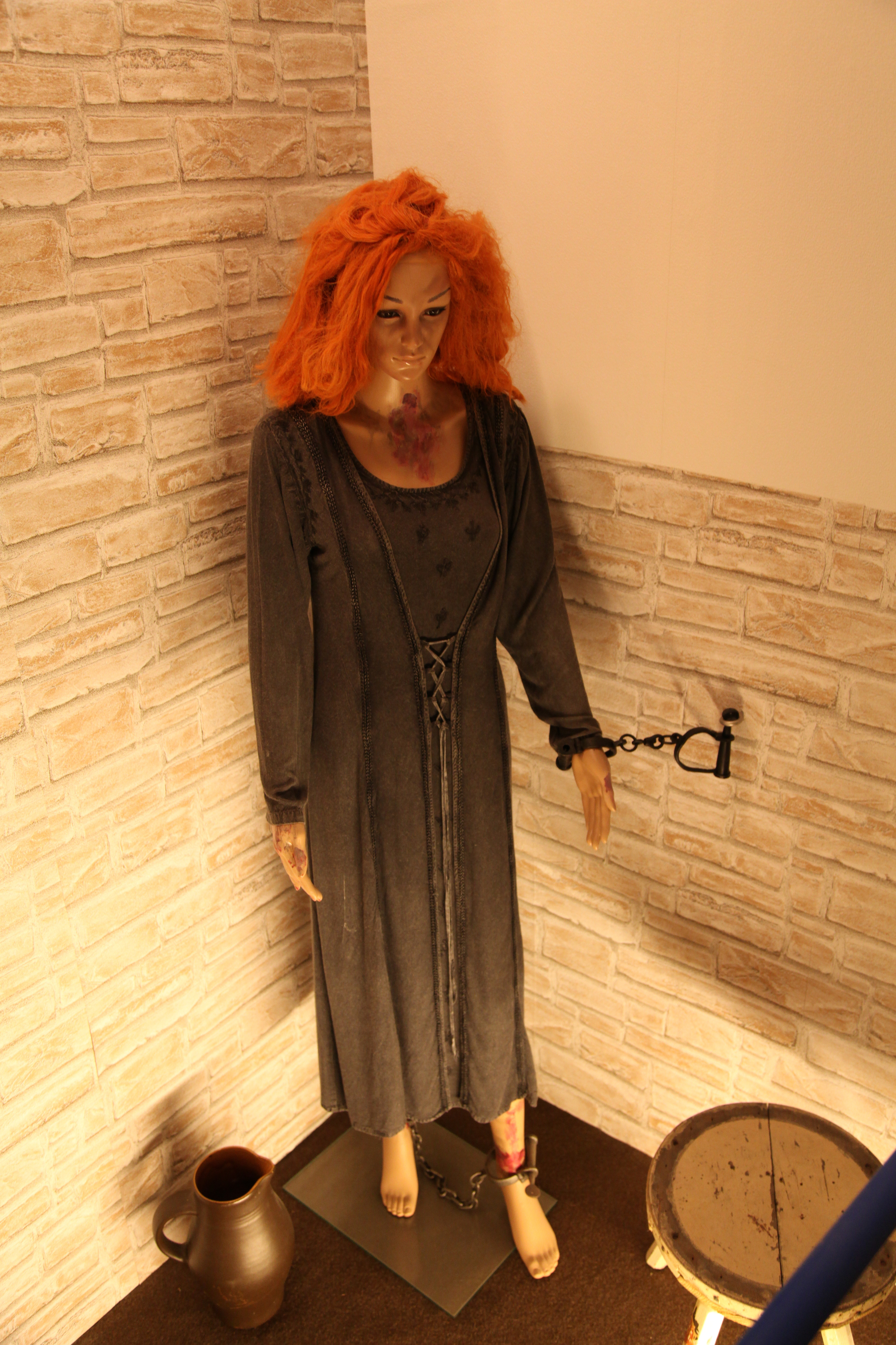 Darstellung der als Hexe hingerichteten Anna Spiekermann im Heimatkabinett Westerholt, Schloßstraße 34 in Herten-Westerholt